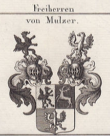 Wappen der Freiherren von Mulzer